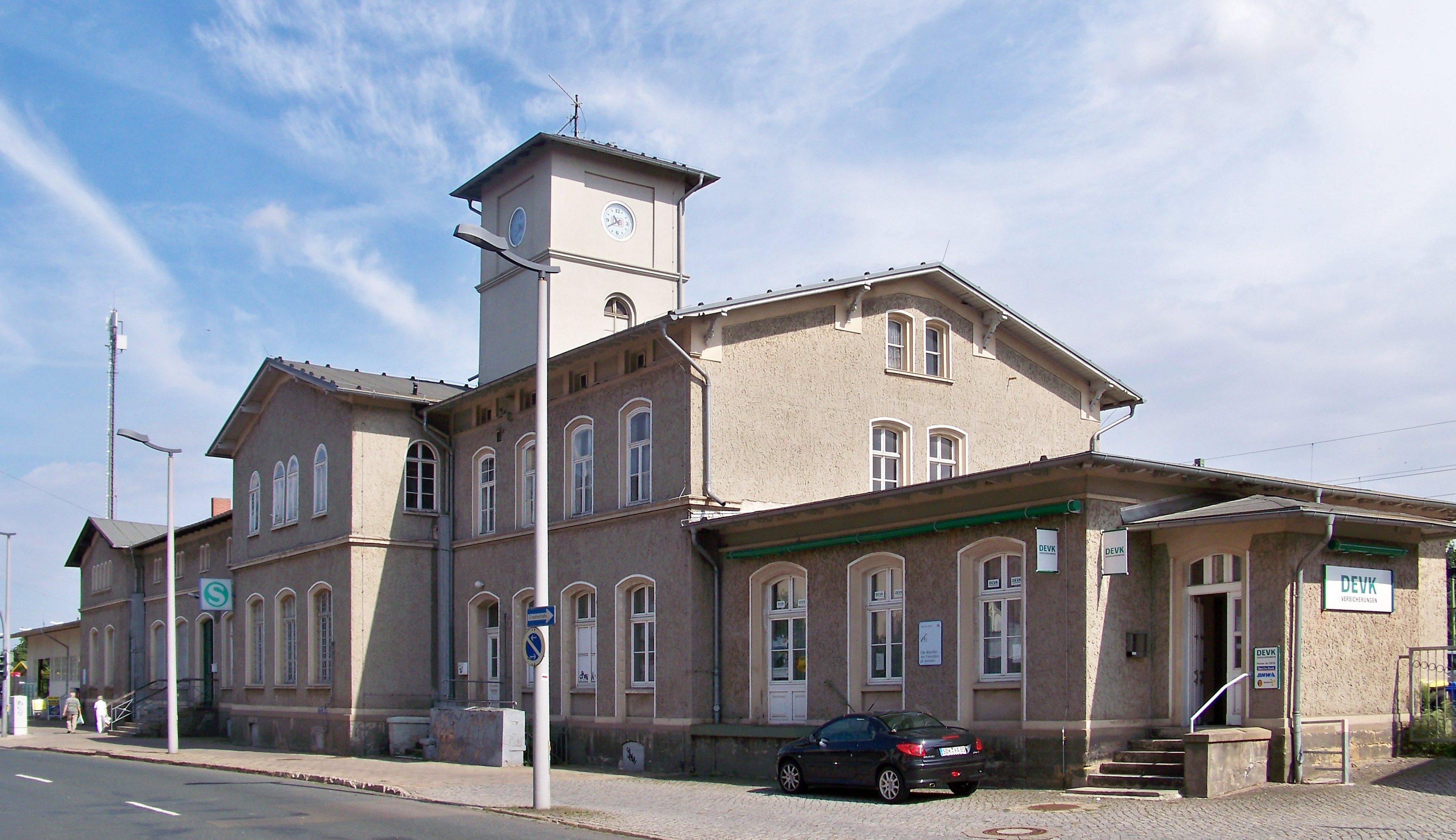 Bahnhof Schönebeck (Elbe).